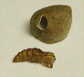 Cydia deshaisiana (Lucas, 1858)